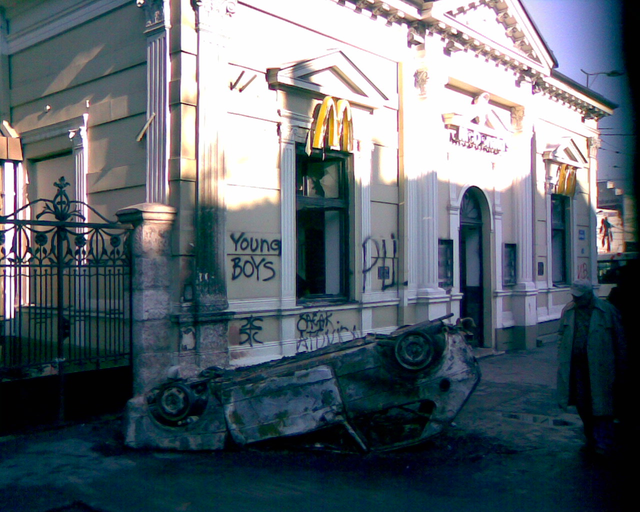 McDonald's after February 21, 2008 in Belgrade/Le McDonald's de la place Slavija le lendemain de la manifestation "Le Kosovo est le Serbie" du 21 février 2008, Belgrade